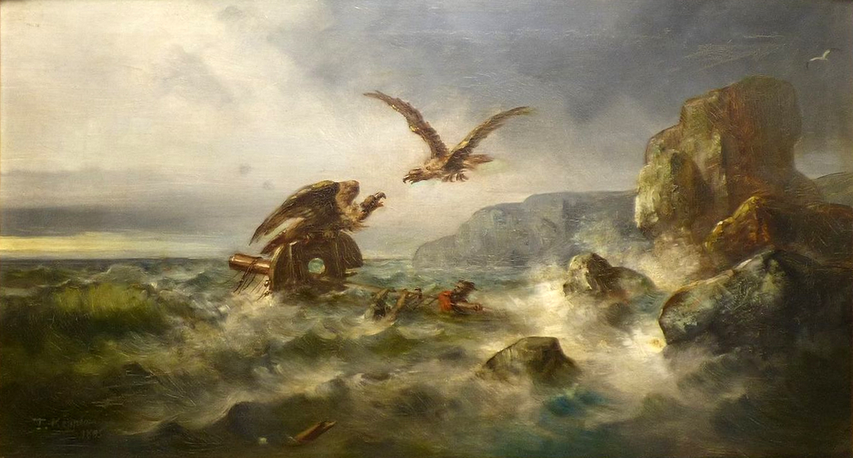 Stürmische See - Schiffbruch